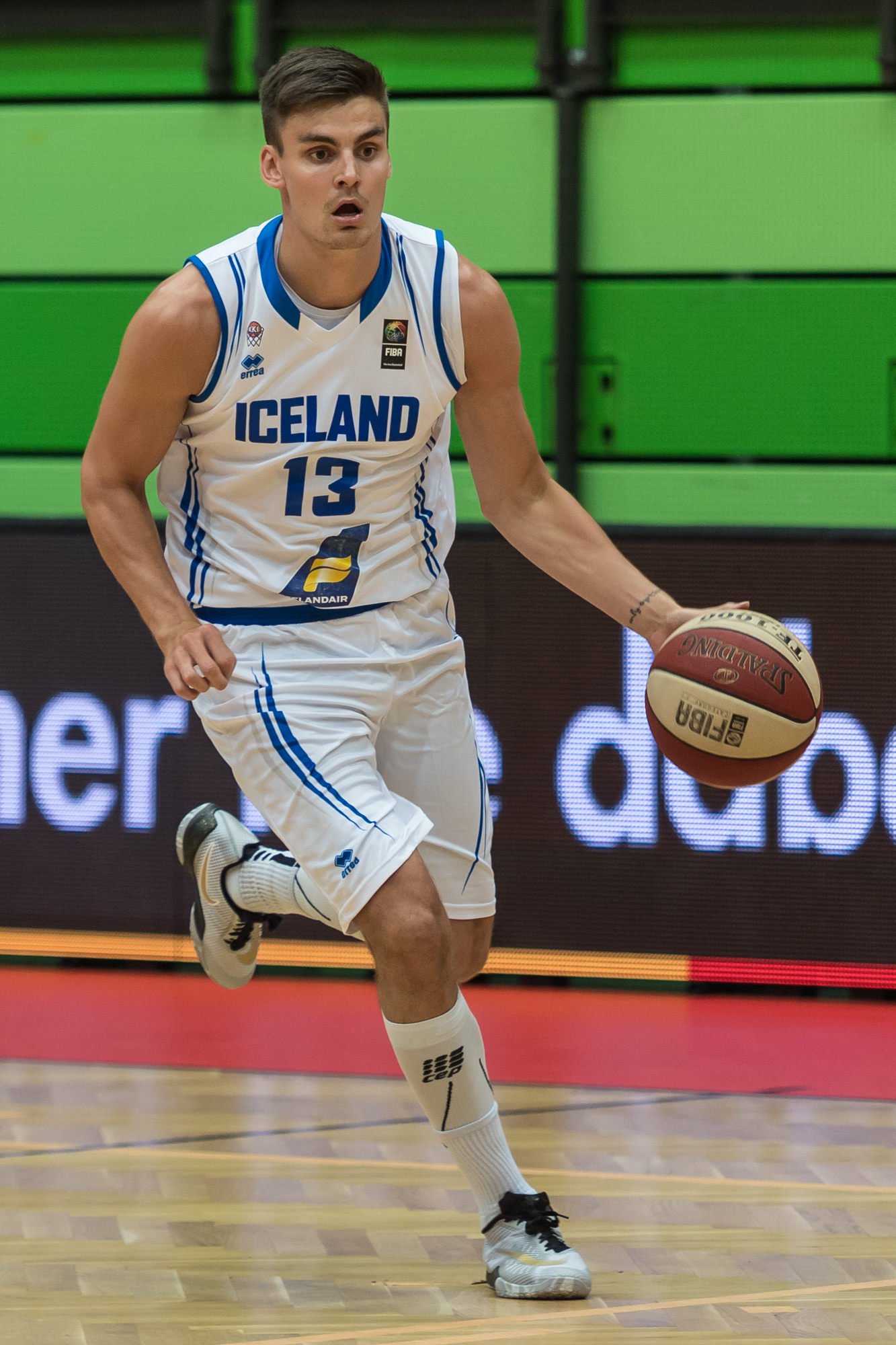 ÖBV Vier-Nationen-Turnier vom 12.-14. August 2016 in Schwechat: Österreich vs Island. Bild zeigt Hoerdur Axel Vilhjalmsson (ISL).